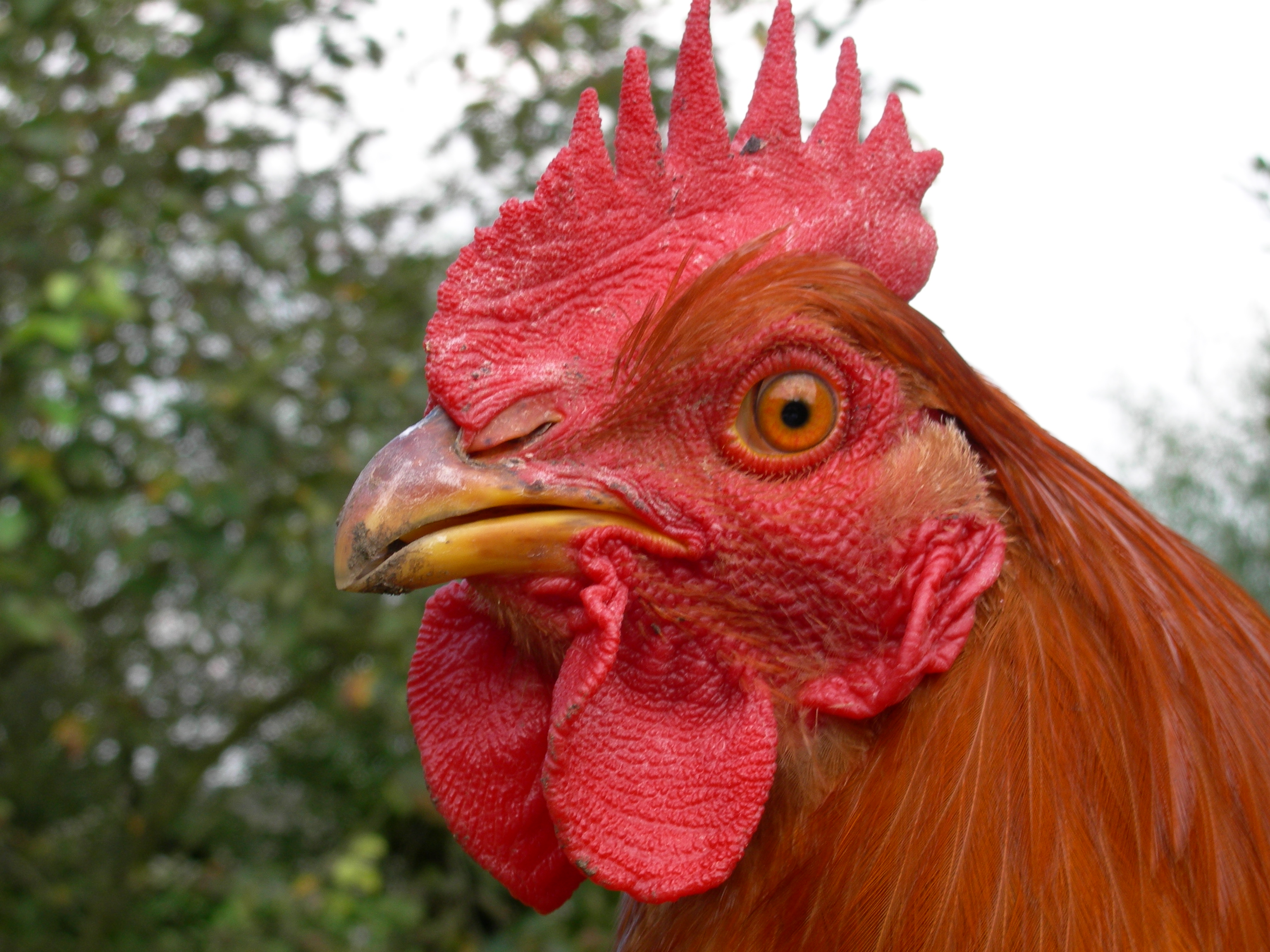 Zijaanzicht kop haan.